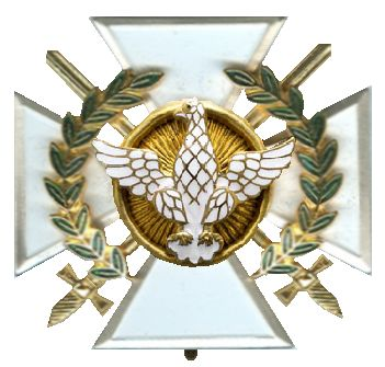 Kruis uit mijn verzameling, bewerkte scan op witte achtergrond